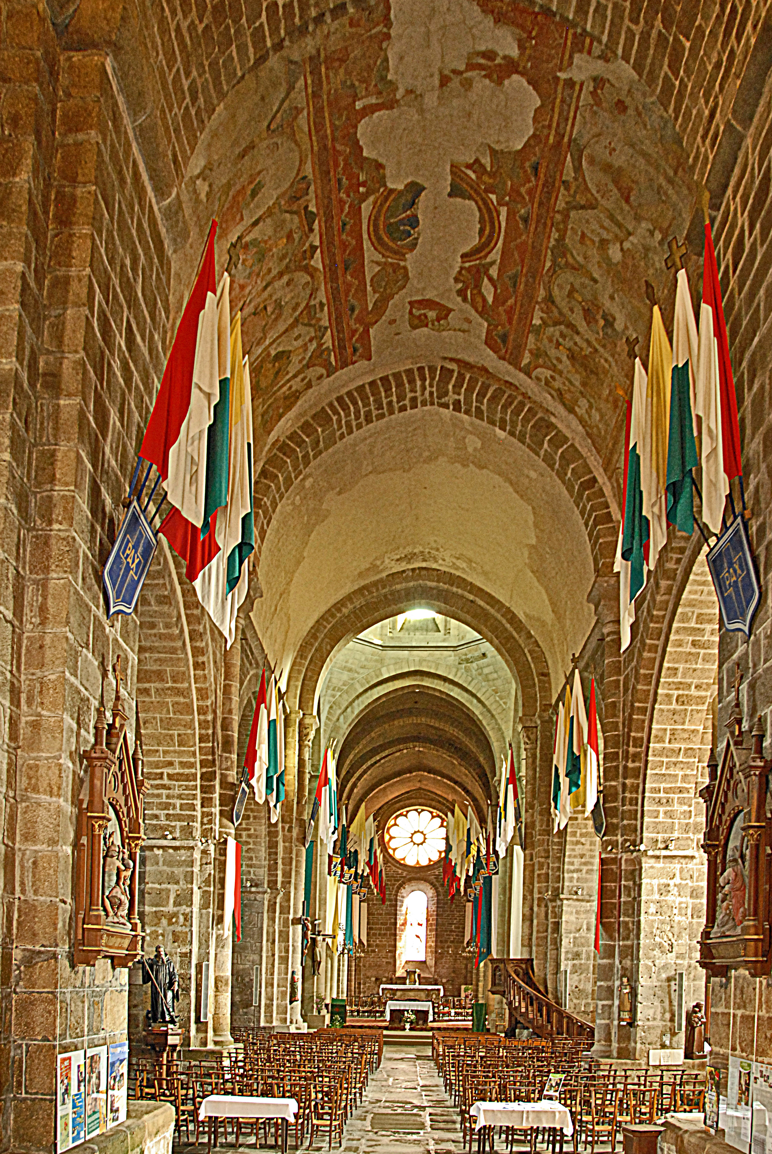 St.Junien, Mittelschiff aus Joch 1